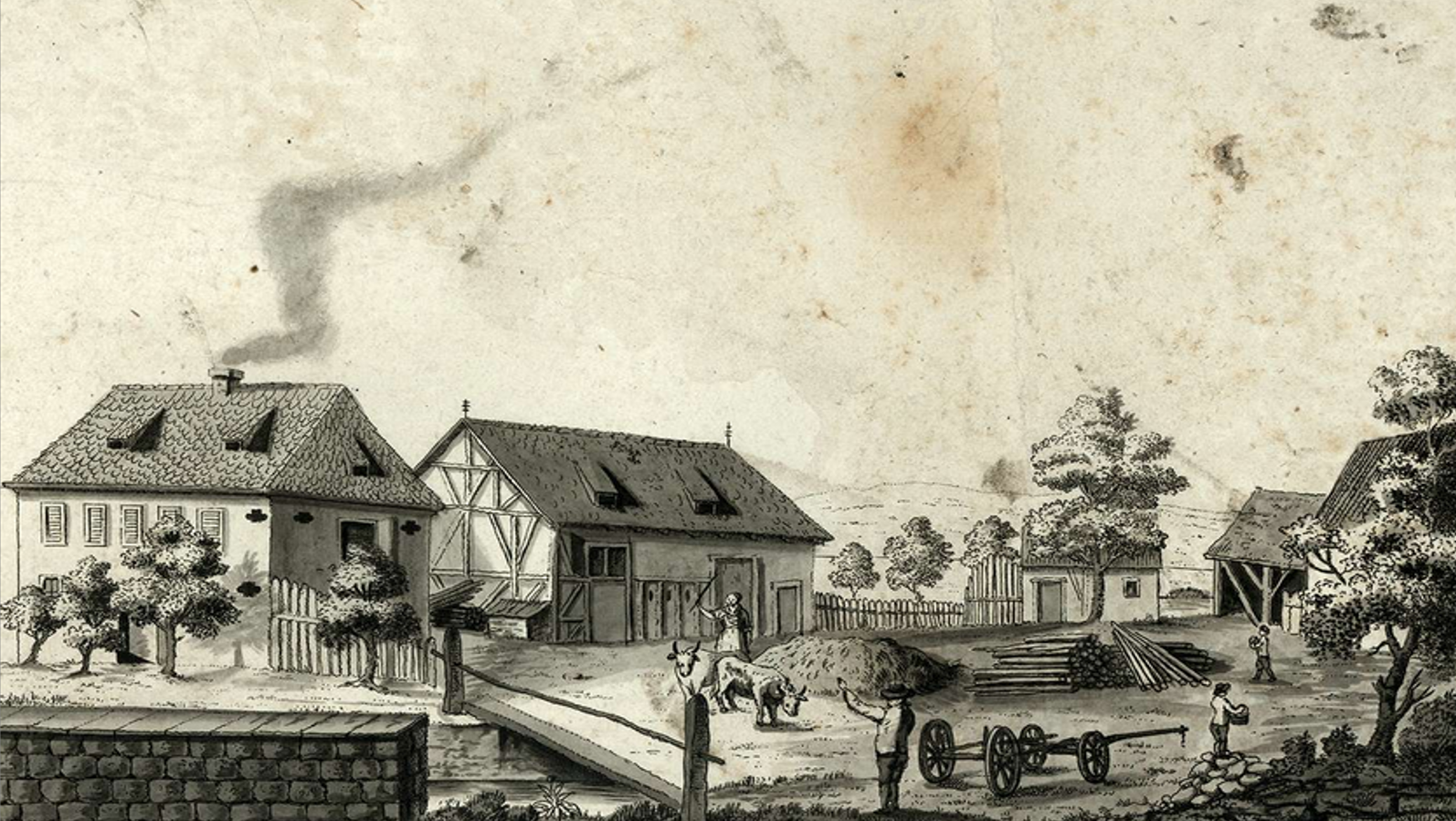 Deutschland (D) - Baden-Württemberg (BW) - Landkreis Konstanz (KN) - Stockach - Hindelwangen: Lohnerhof um 1820